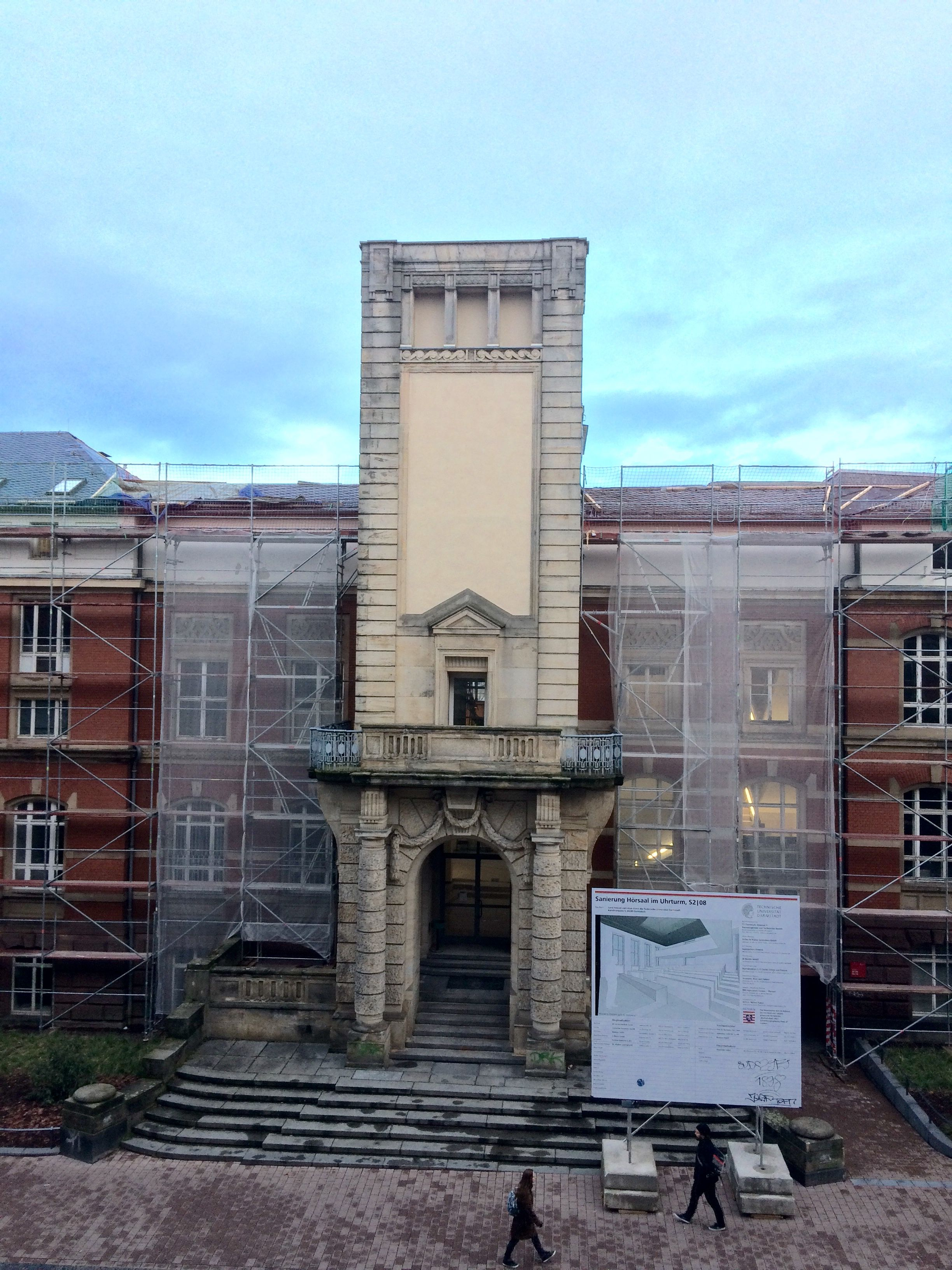 sog. Pützer-Turm in der Hochschulstraße